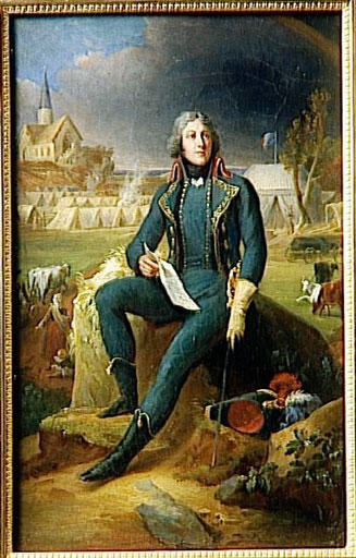 Général Louis Lazare Hoche (1768-1797)